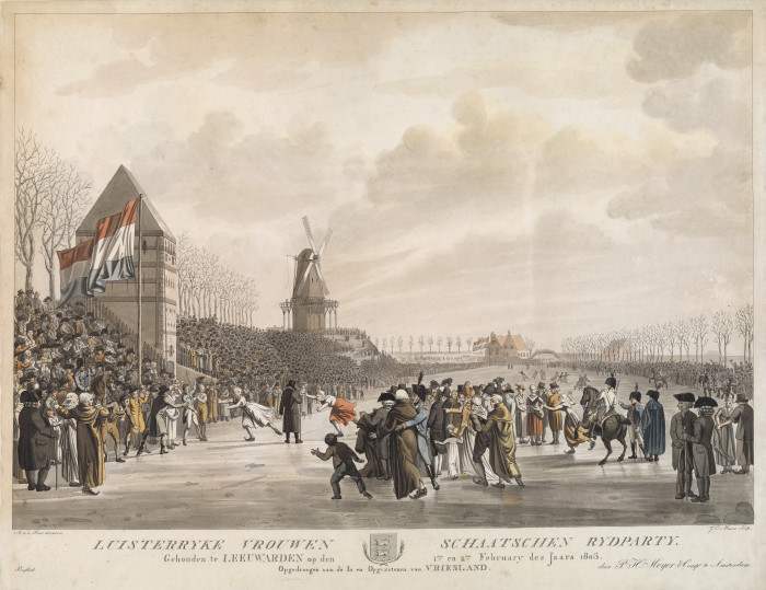 Gravure van de vroegst bekende Nederlandse schaatswedstrijd voor vrouwen te Leeuwarden in 1805